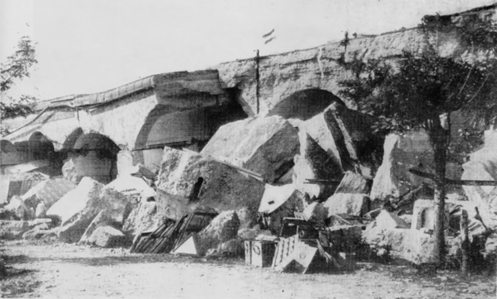 Zniszczone piętrowe koszary szyjowe fortu XIII "San Rideau".